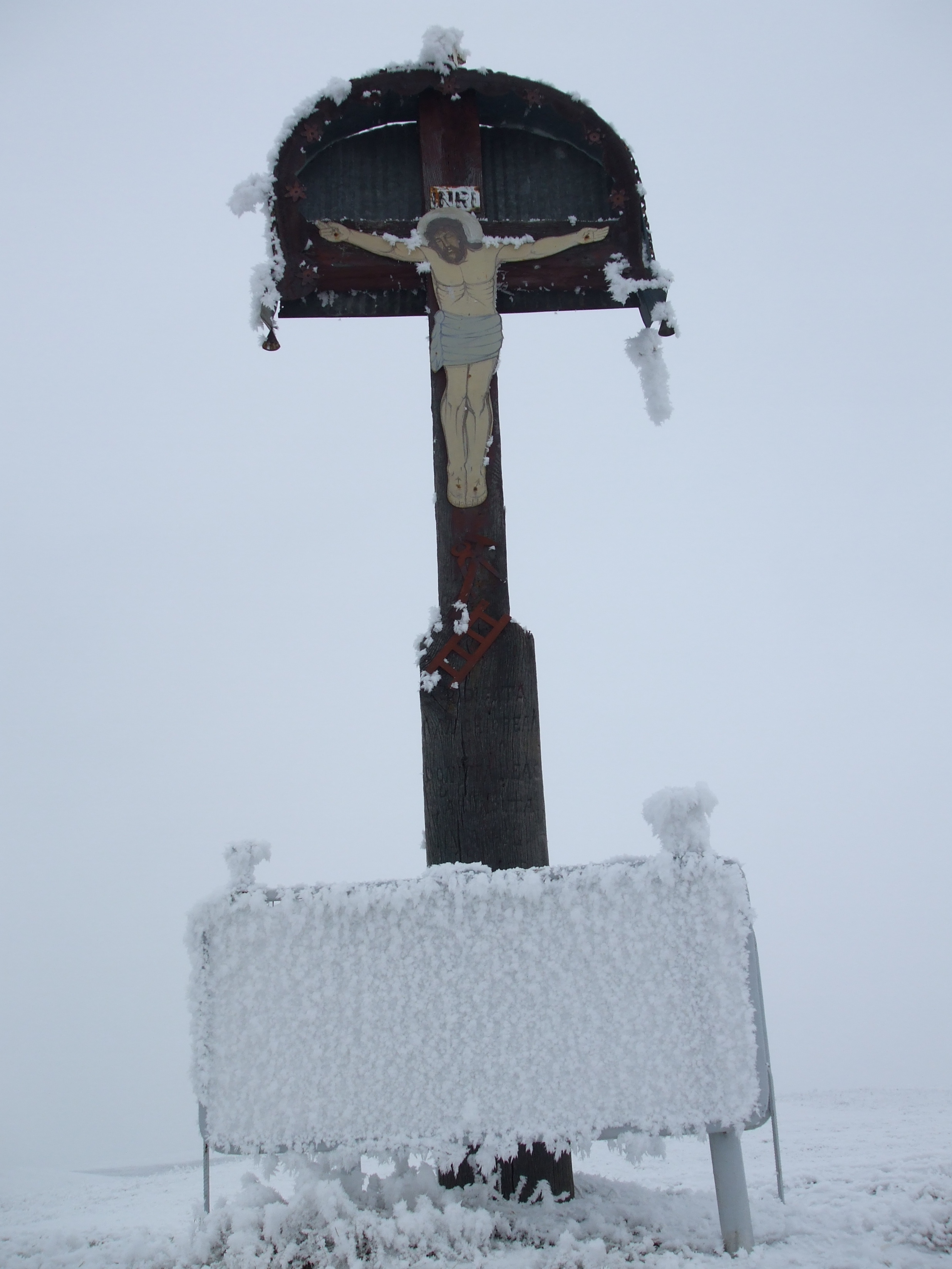 imagini din Aruncuta,Cluj